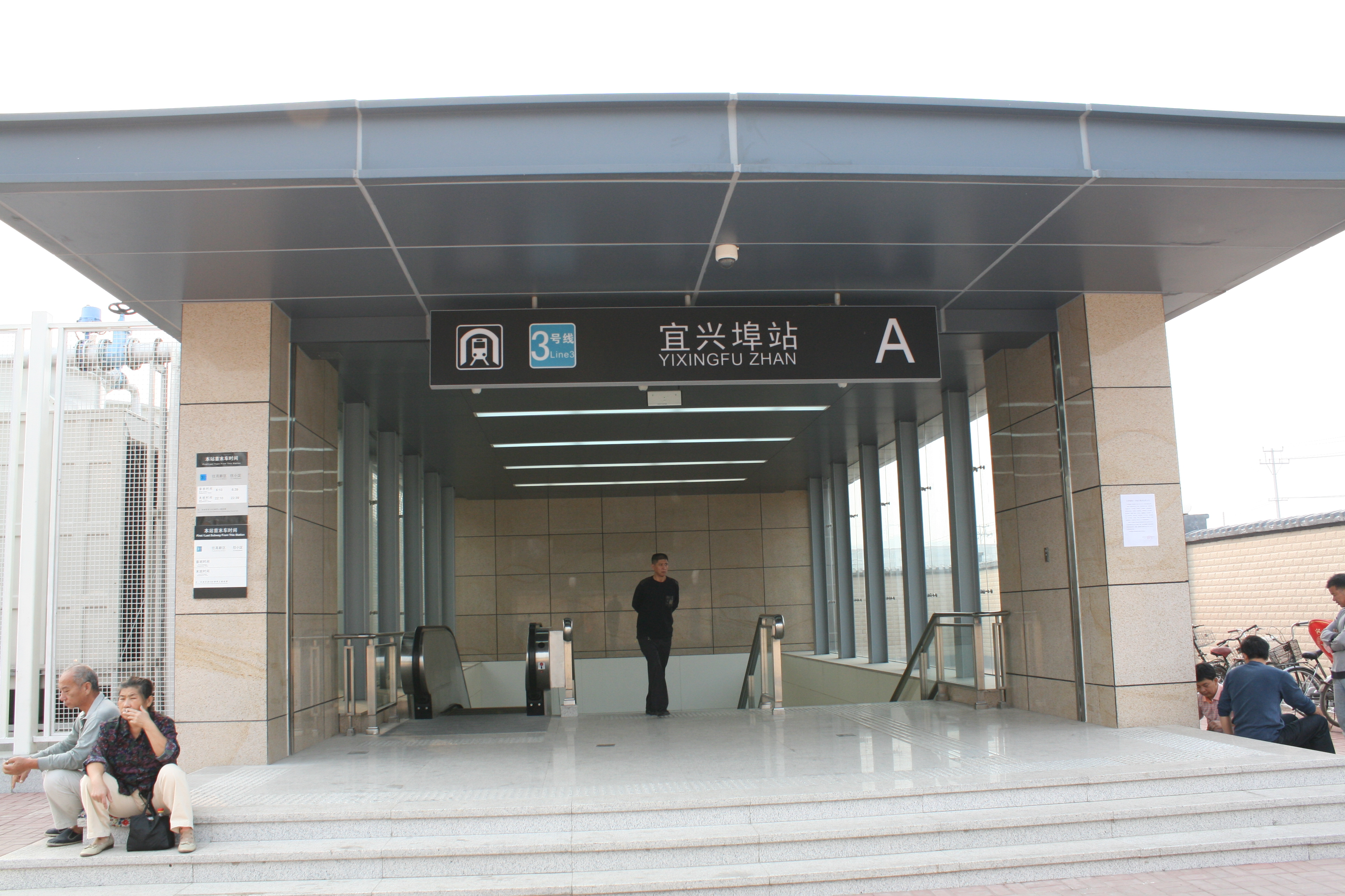 天津地鐵三號線宜兴埠站A出口 0001